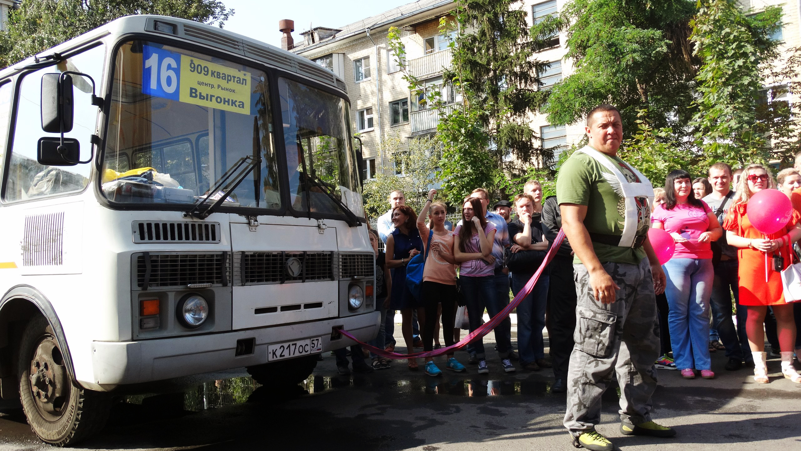 Михаил Кокляев перед перетягиванием автобуса ПАЗ-32053 в городе Орёл